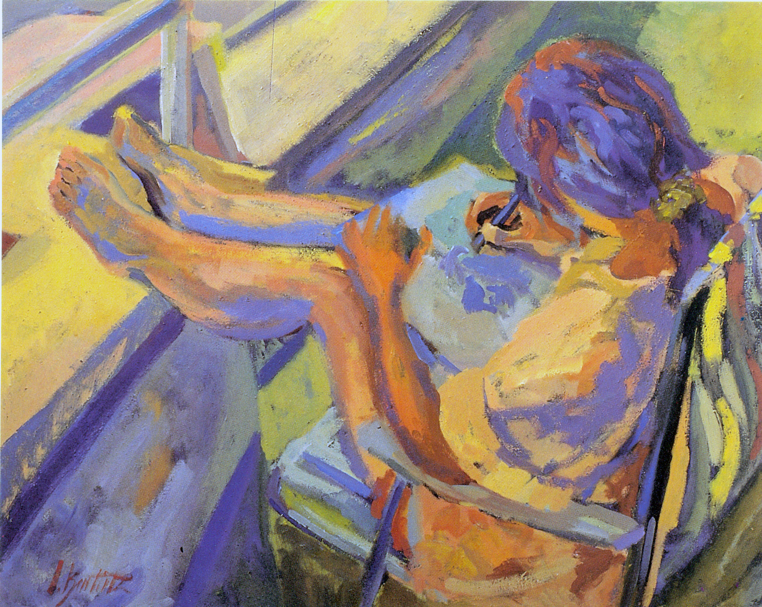 "Dibujando el paisaje" óleo/lienzo 73 x 92 cm.